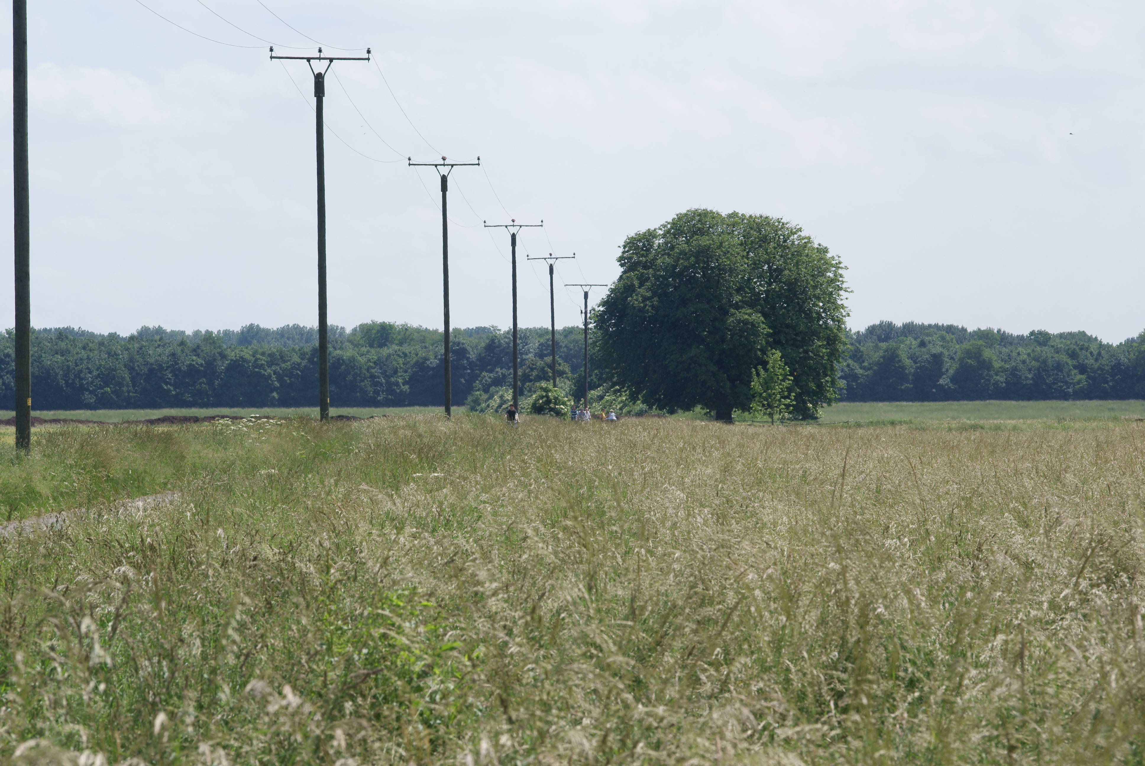 Naturdenkmal Kastanie Himmelgeist/ Natural Monument Horse-chestnut in Himmelgeist, Duesseldorf/ Germany